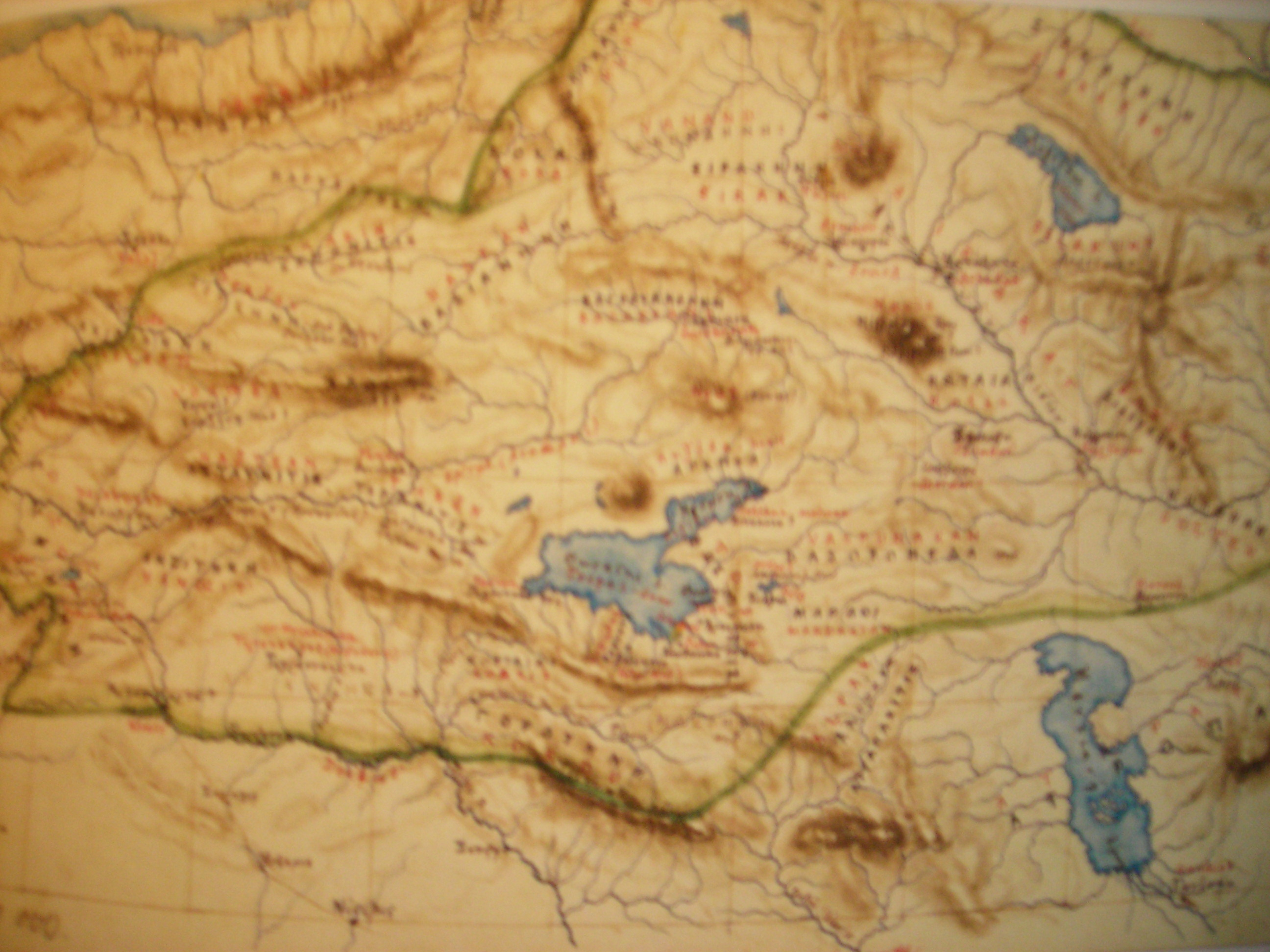 Ancienne Carte de l'Arménie